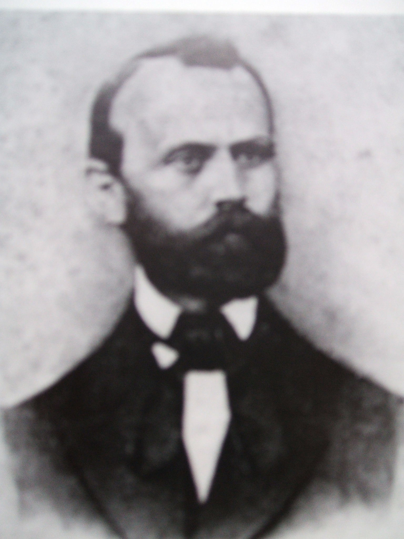 Das Foto zeigt Otto Fock. Es handelt sich hier um ein Werk eines unbekannten Künstlers aus Lebzeiten Focks.